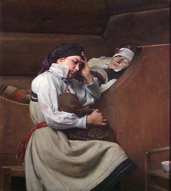 Woundedlabel QS:Len,"Wounded"